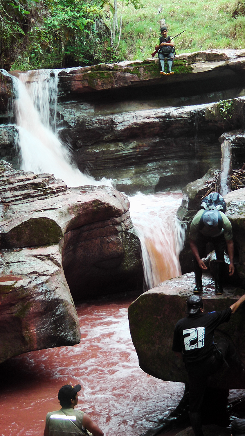 Cascada El Cañón Dorado